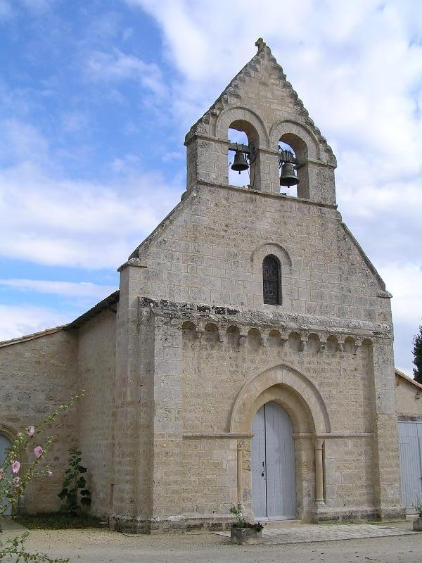 église St-Hilaire de Londigny en Charente, France